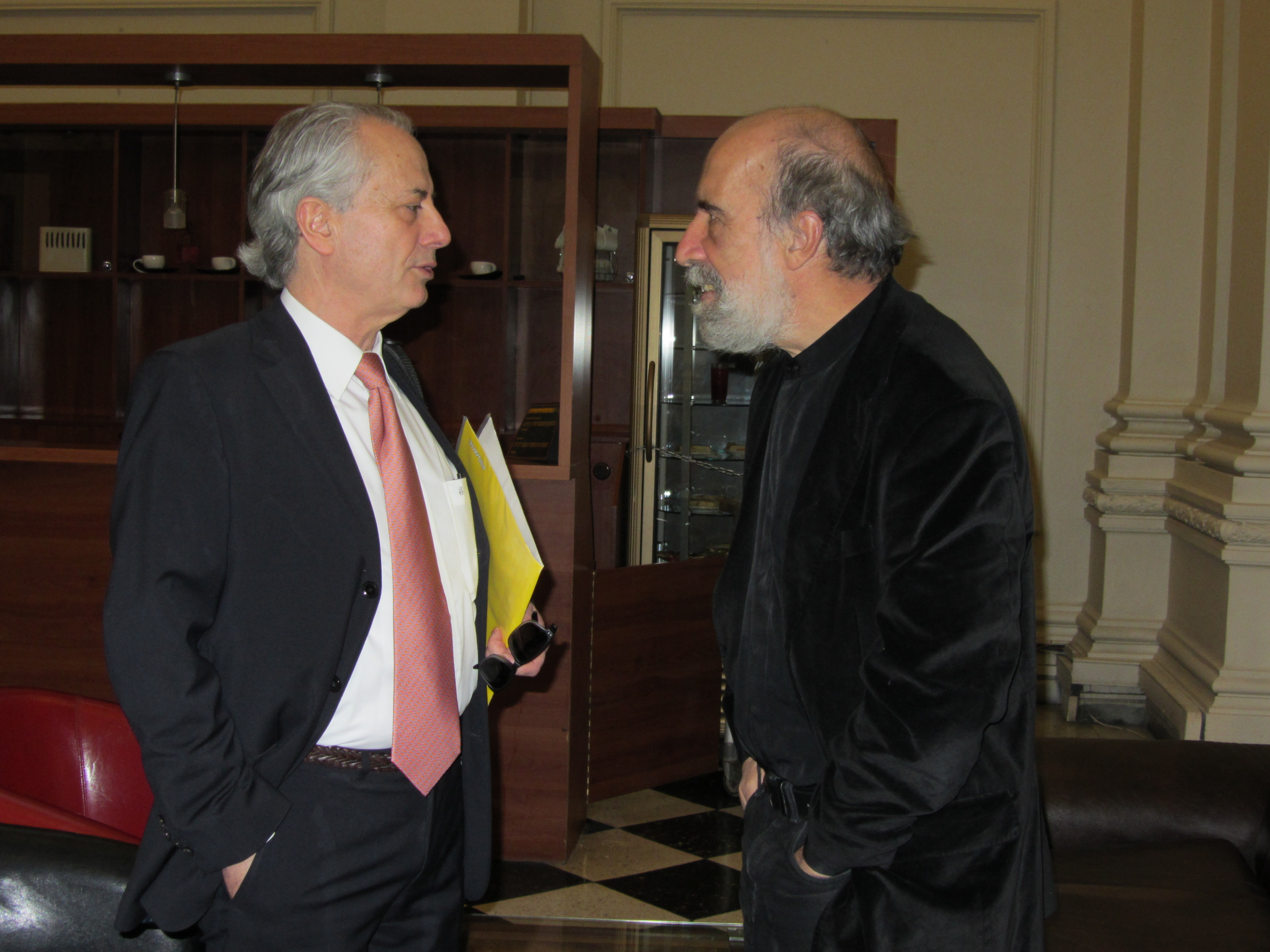 Rodrigo Tomás Rojas y el poeta Raúl Zurita; presentación del libro Íntegra de Gonzalo Rojas en la Biblioteca Nacional de Santiago, 25 de abril de 2013